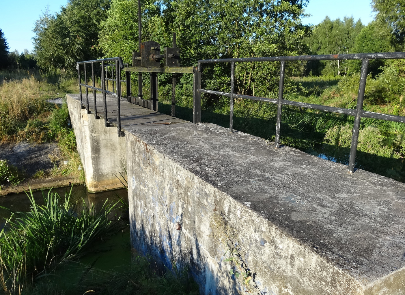 Noteć (Nowy Kanał Notecki) w Brzozie, gmina Nowa Wieś Wielka, powiat bydgoski